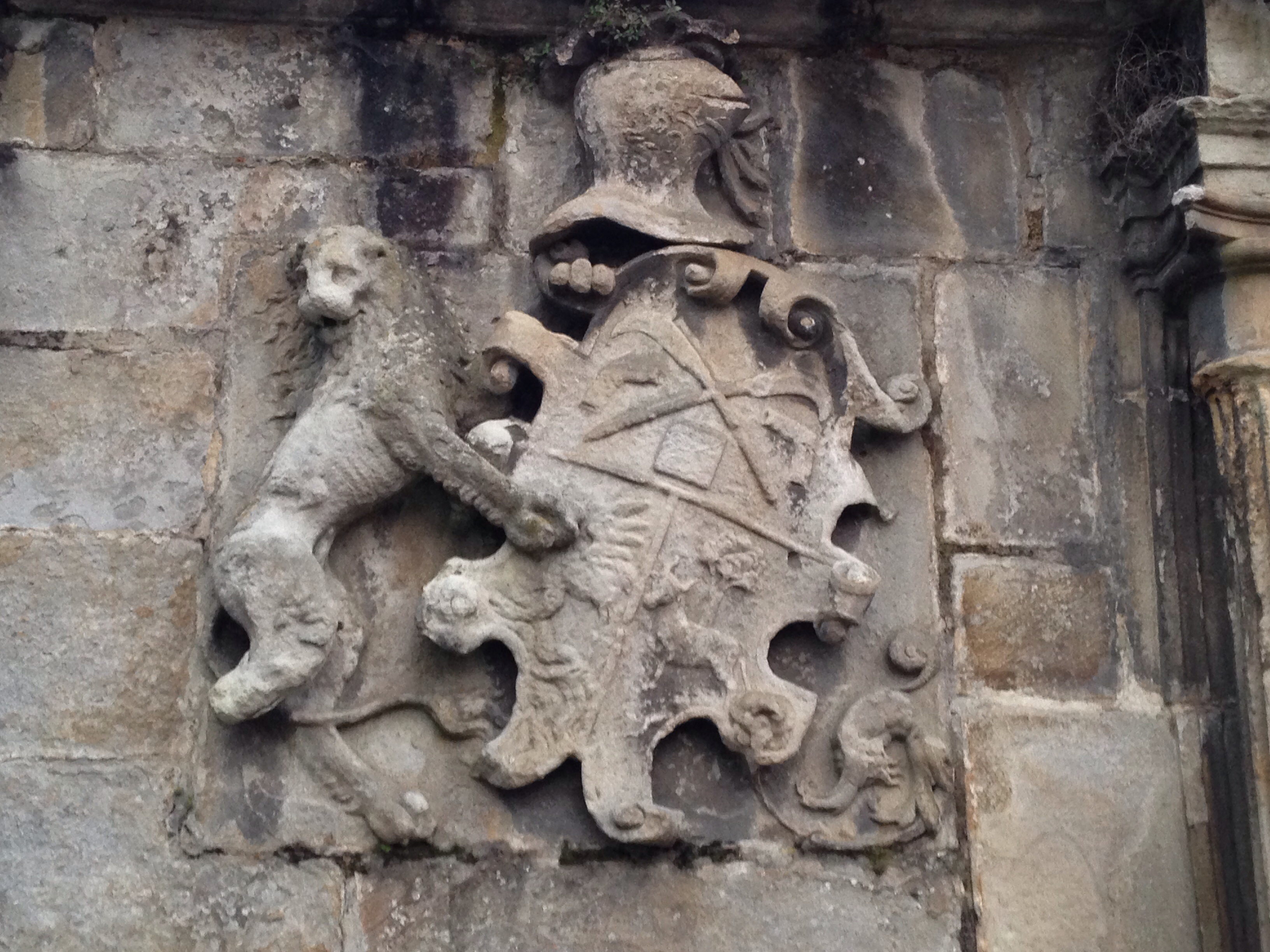 Ozaeta jauregiko ezkerreko sarrera-armarria, Bergara (Gipuzkoa)